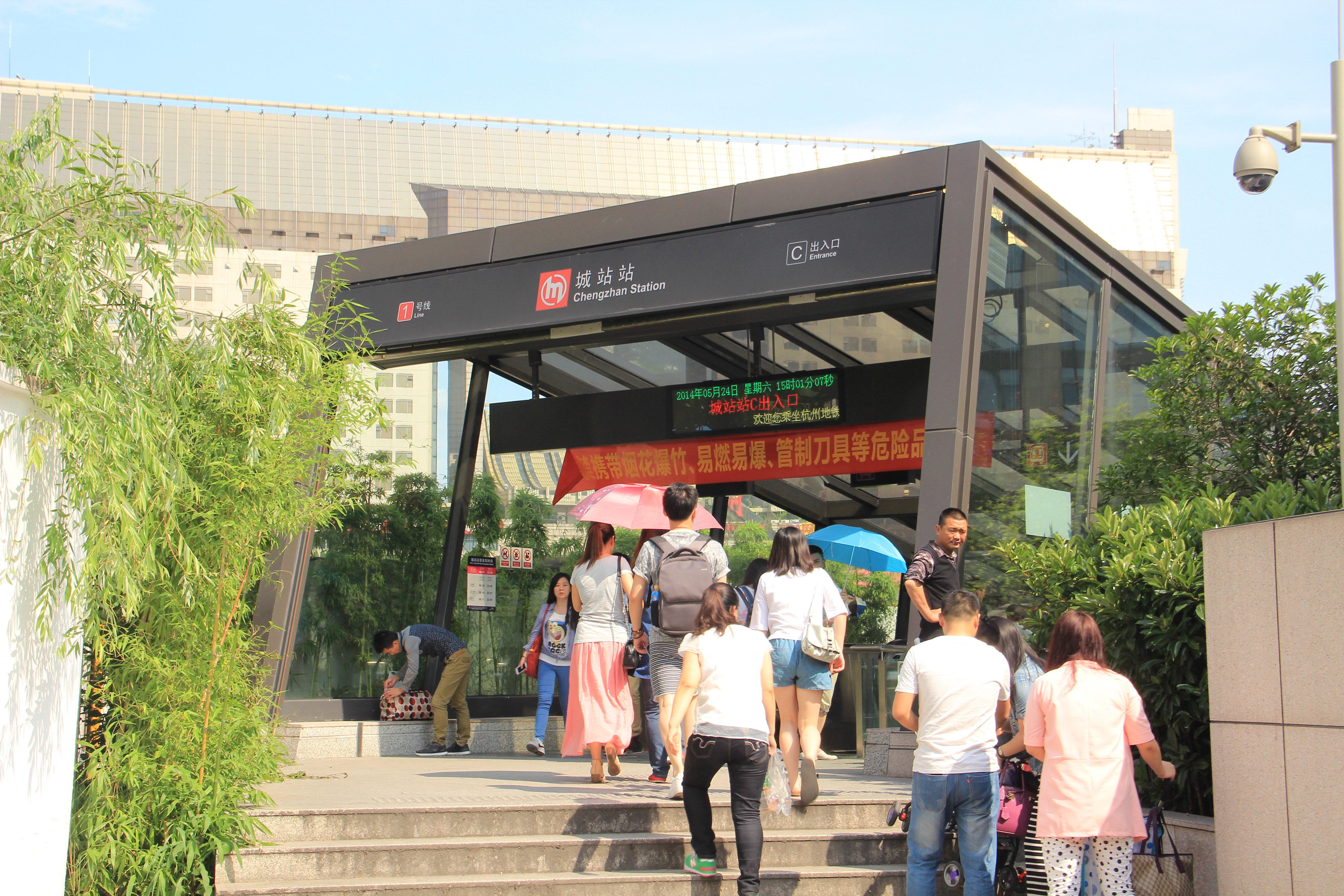 中文（中国大陆）: 杭州地铁1号线城站站C出入口